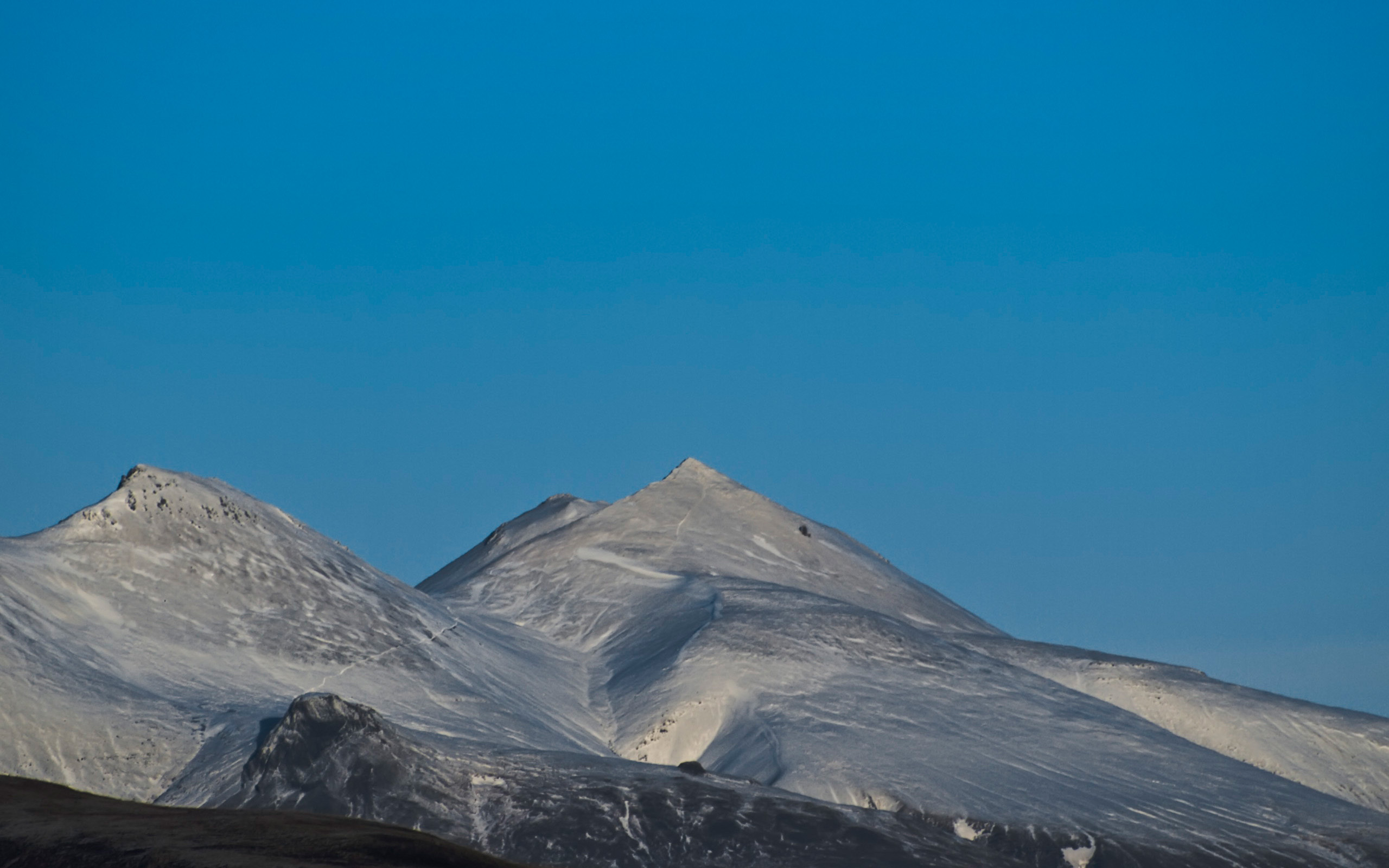 Karlmannatindur